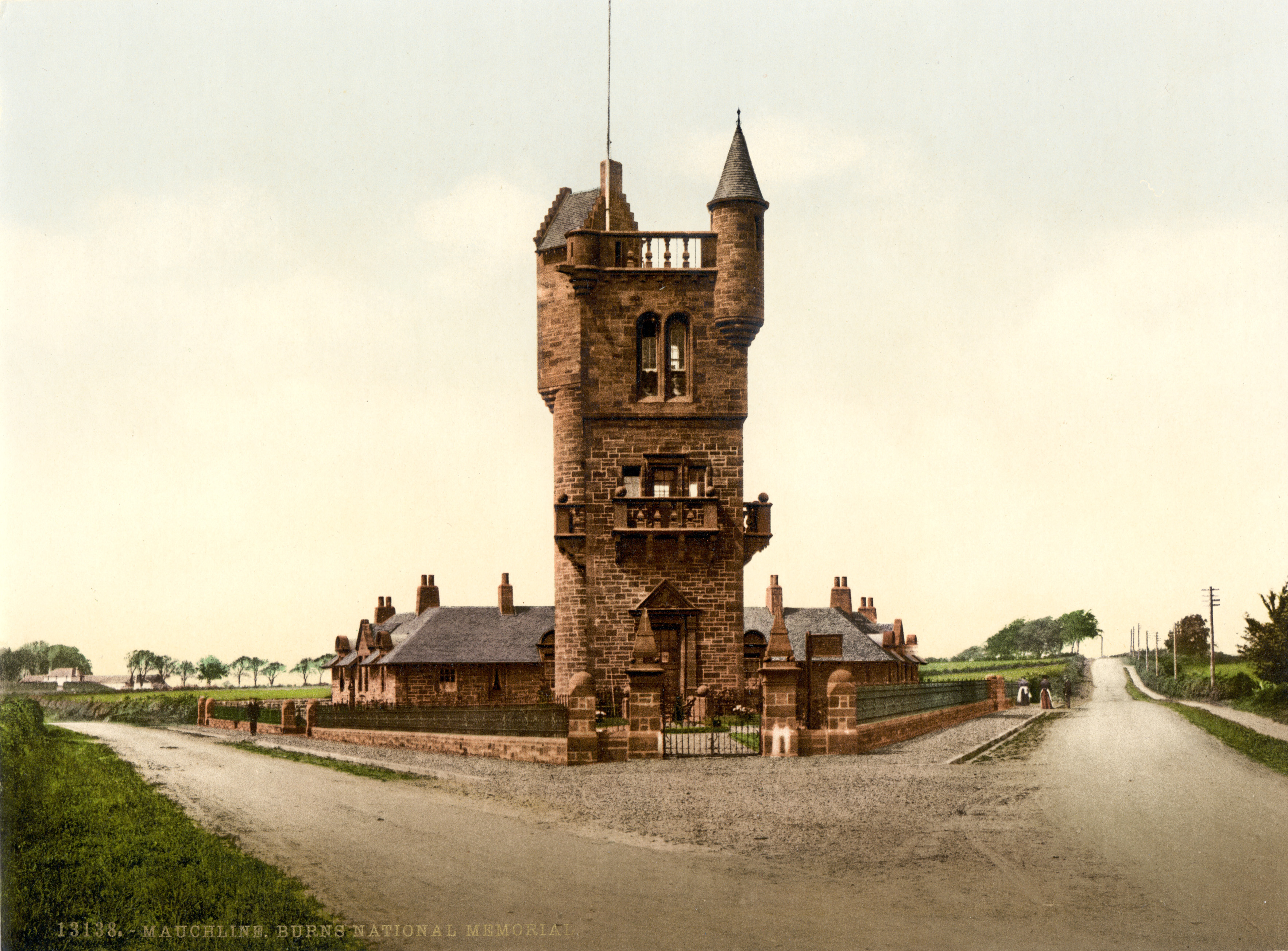 Robert Burns National Monument, Mauchline, Scotland